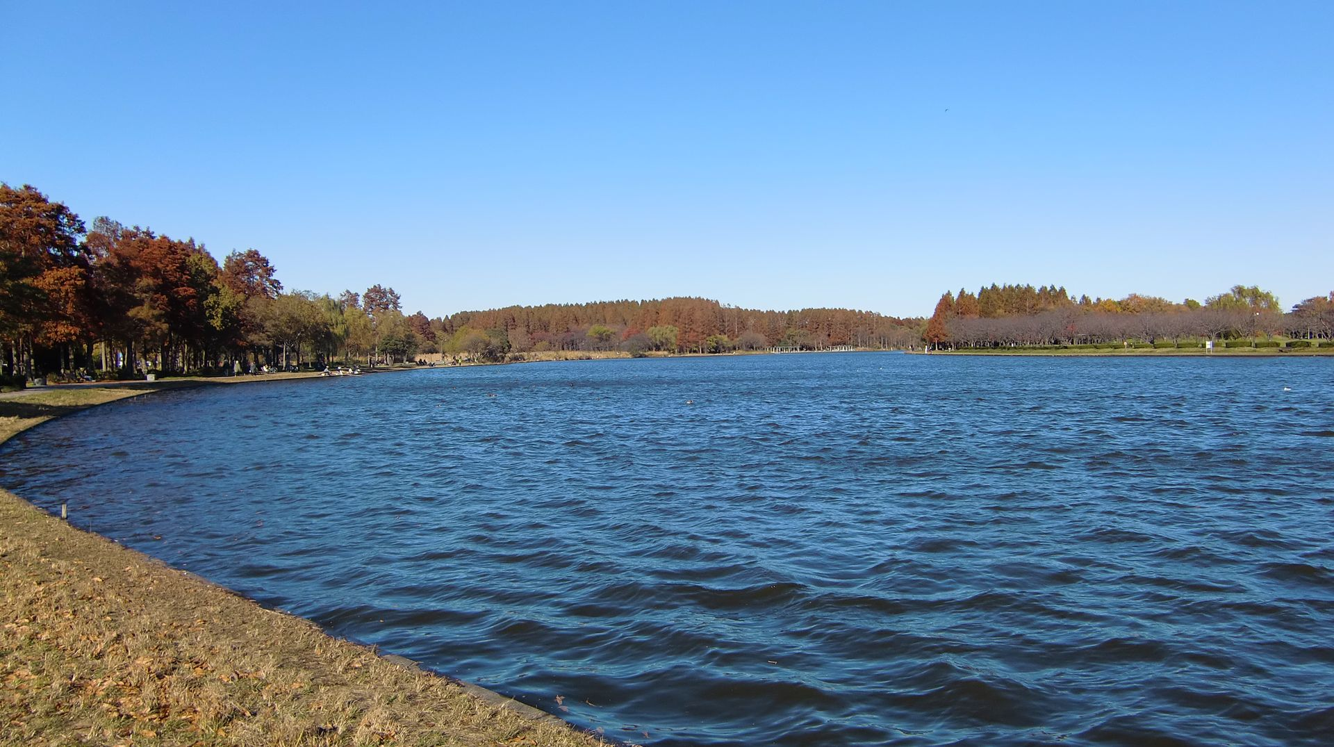 大場川につながる湖